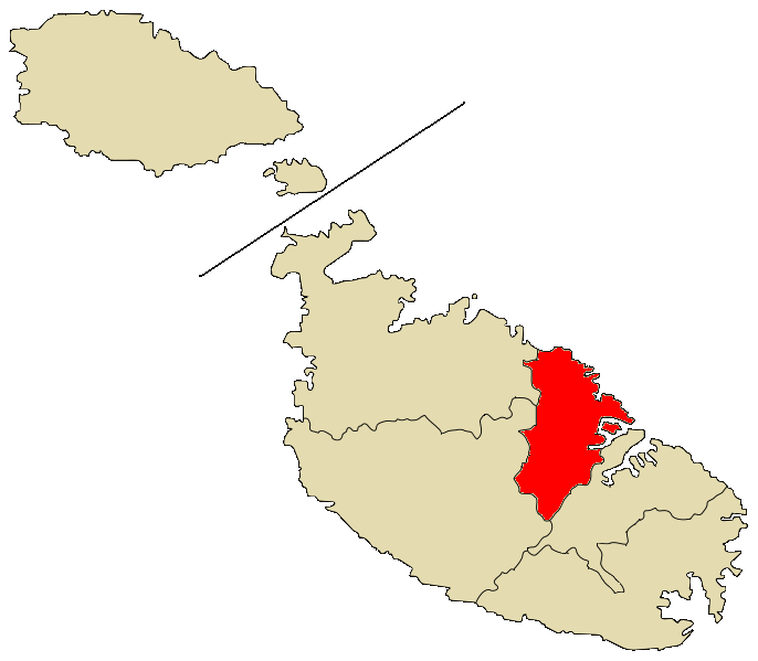 Distrito del Puerto Septentrional, Malta.